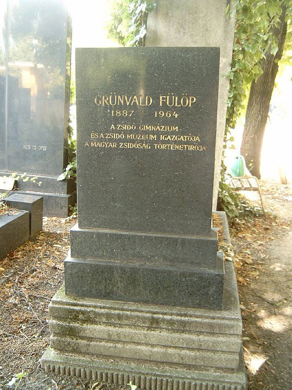 Grünwald Fülöp (Sopron, 1887. augusztus 31. – Budapest, 1964. január 3.) tanár, történész sírja Budapesten. Kozma utcai izraelita temető: 5B-9-1.